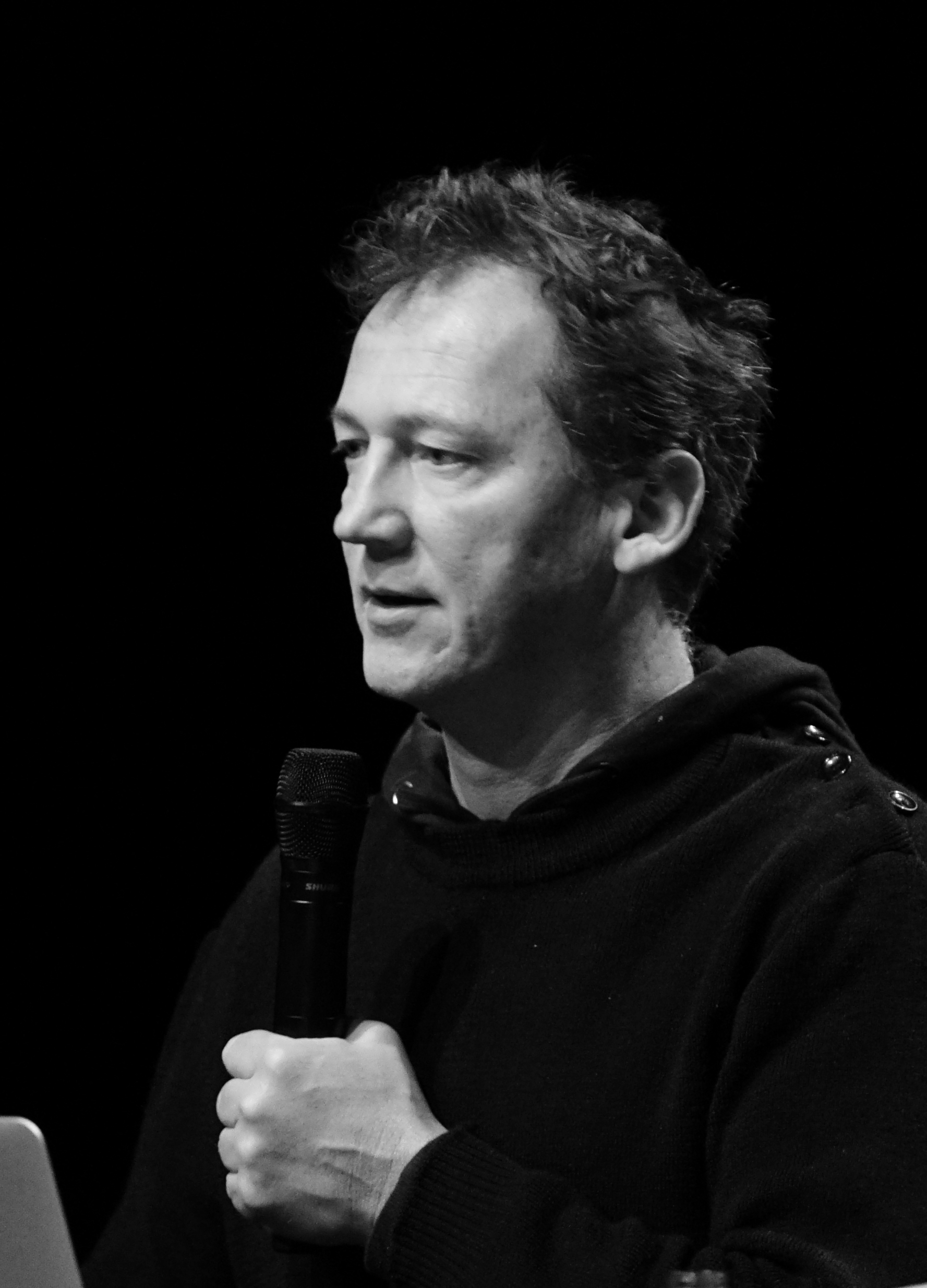 lors de Reims scènes d’Europe en 2019.